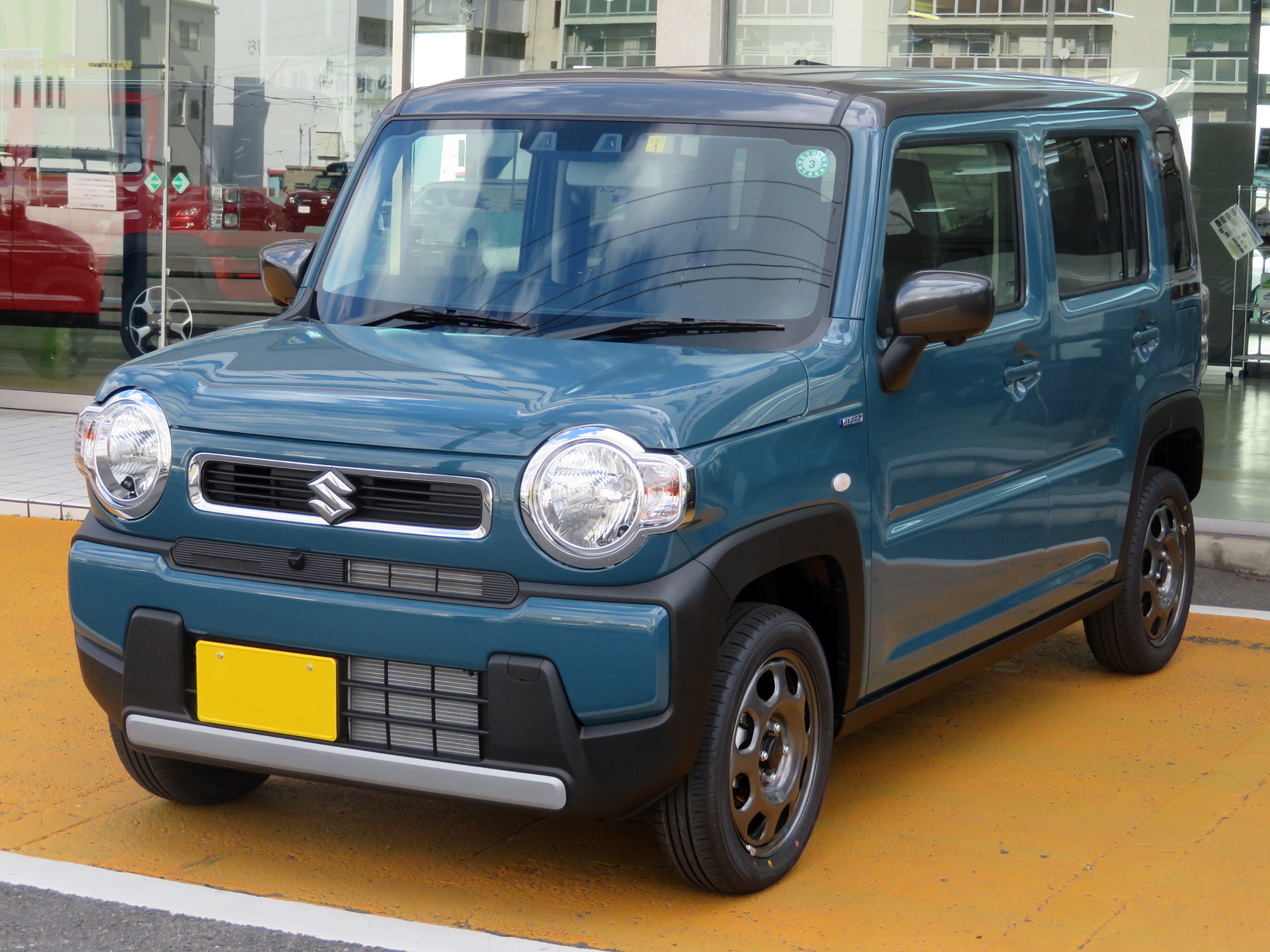 5AA-MR92S-HBGB-JN型スズキ・ハスラーHYBRID G 2WDをフロントから撮影。